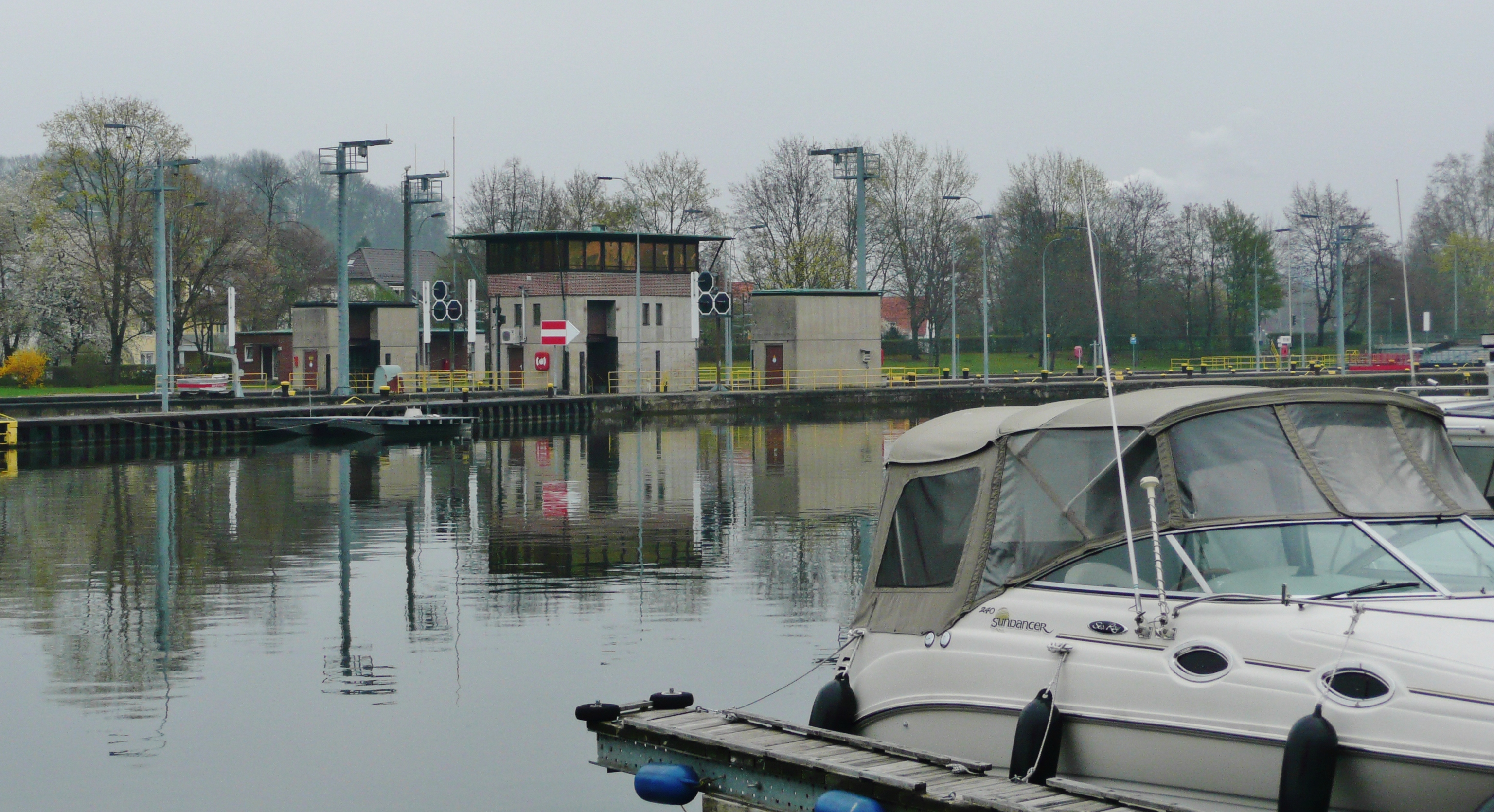 Beim 366 km langen Neckartalradweg: Neckarschleuse Hofen (Dezember 1936 eröffnet)